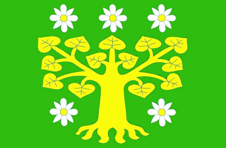 vlajka, Dobré, okres Rychnov nad Kněžnou